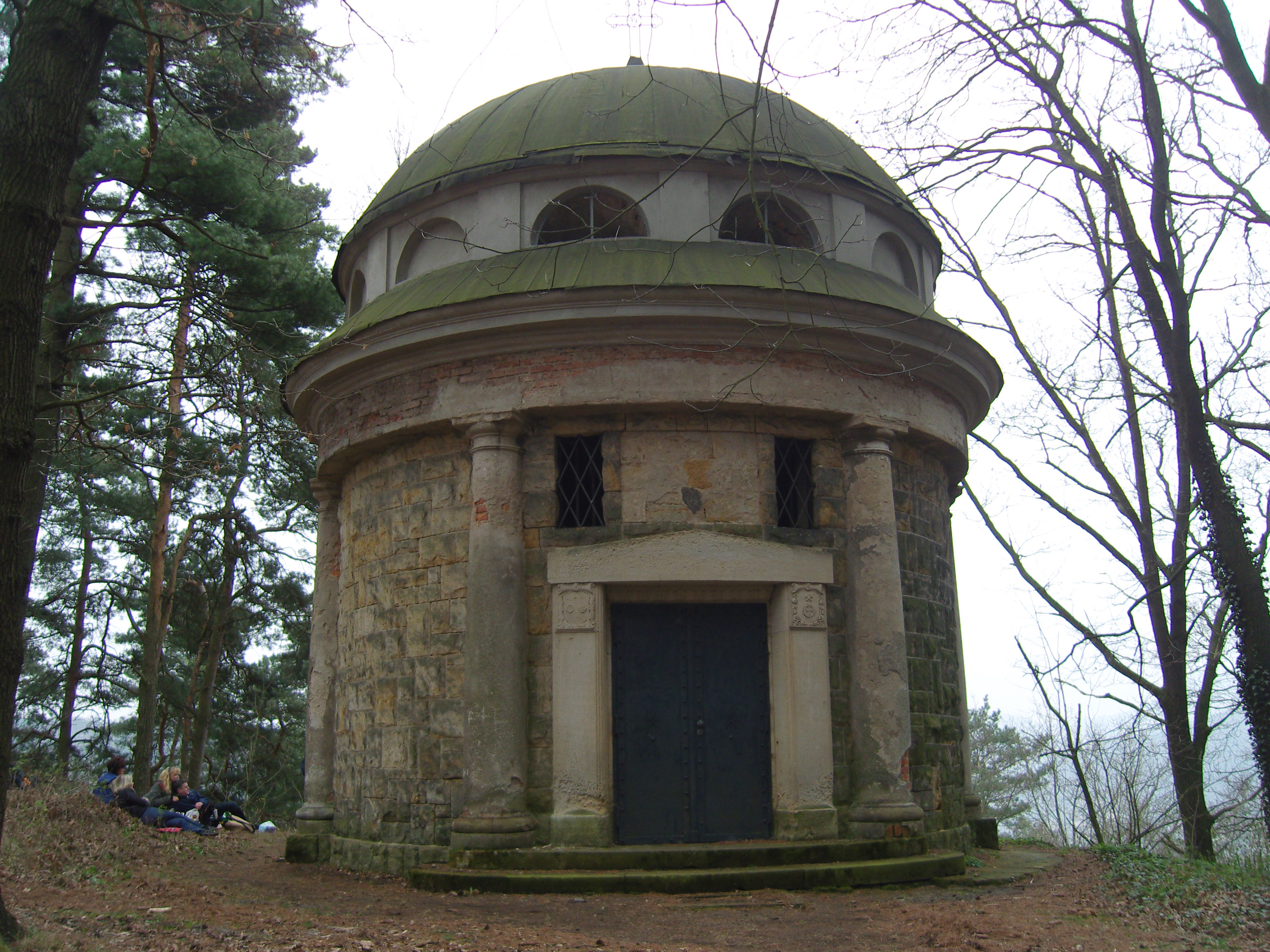 Mausoleum Thürmsdorf in Thürmsdorf (Struppen)